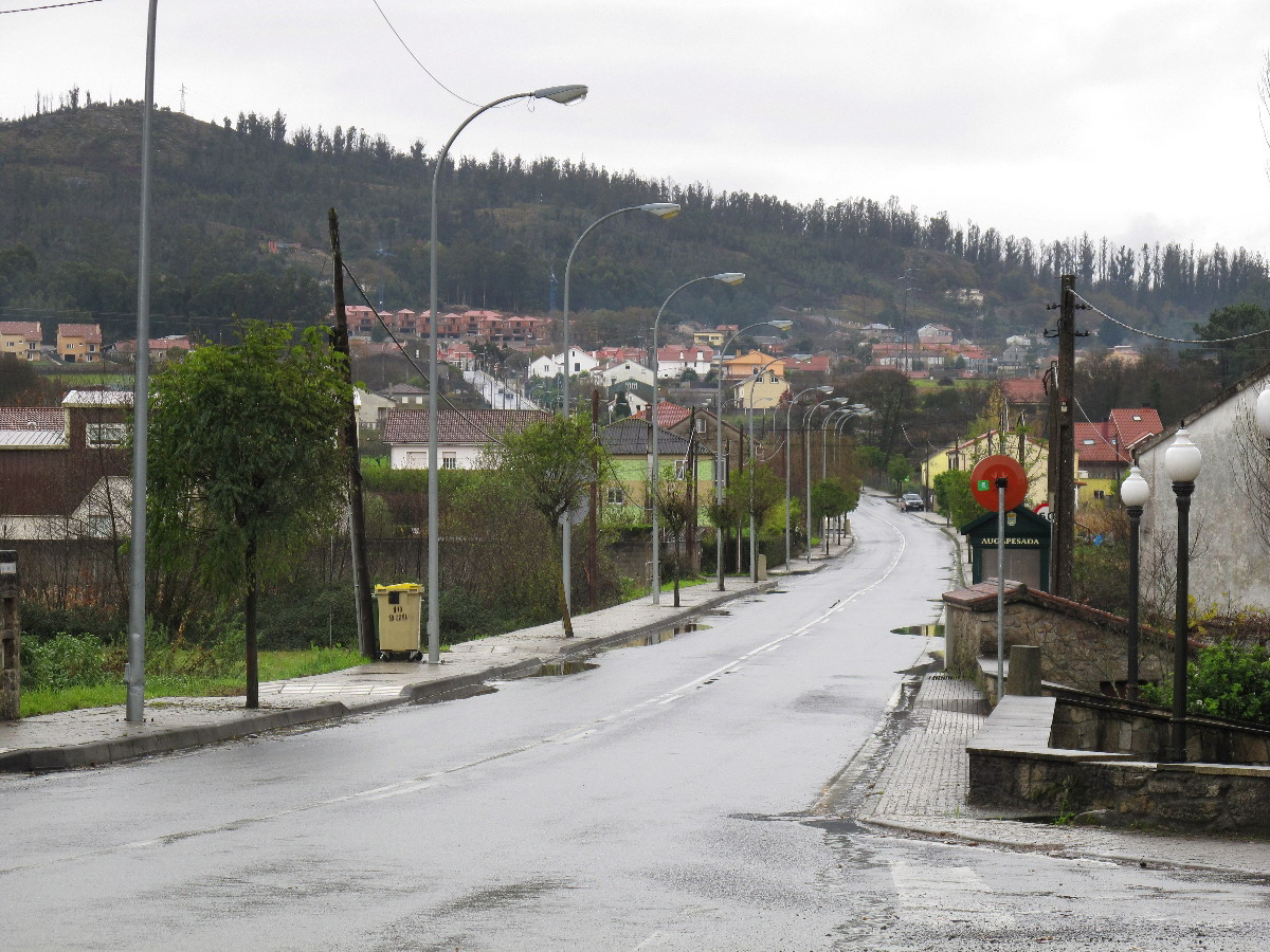 Augapesada, parroquia de Ames, concello de Ames